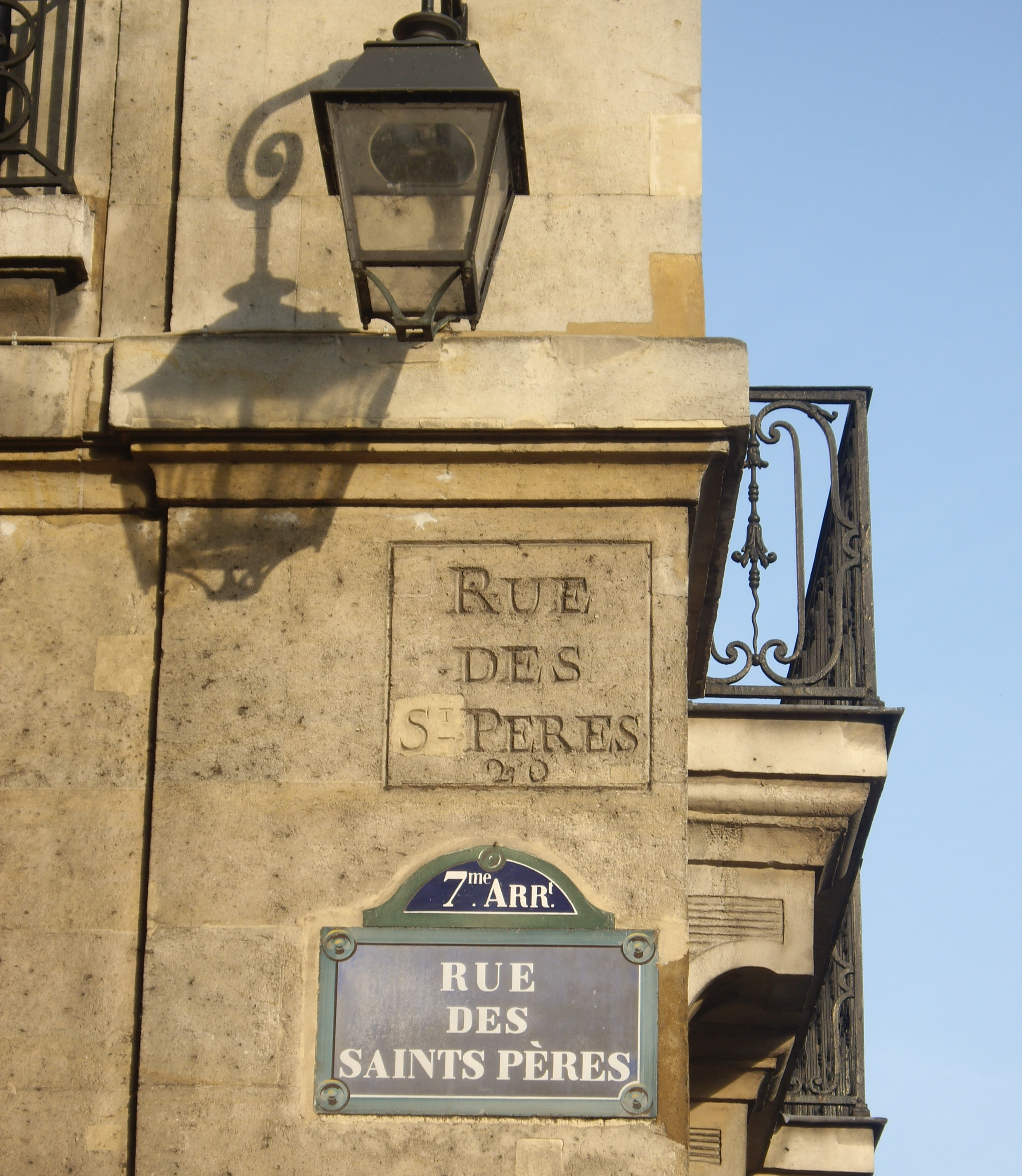 Rue des Saints-Pères, Paris 7e. La mention « St. » sur l'ancienne plaque fut vraisemblablement effacée pendant la Révolution et rétablie par la suite.